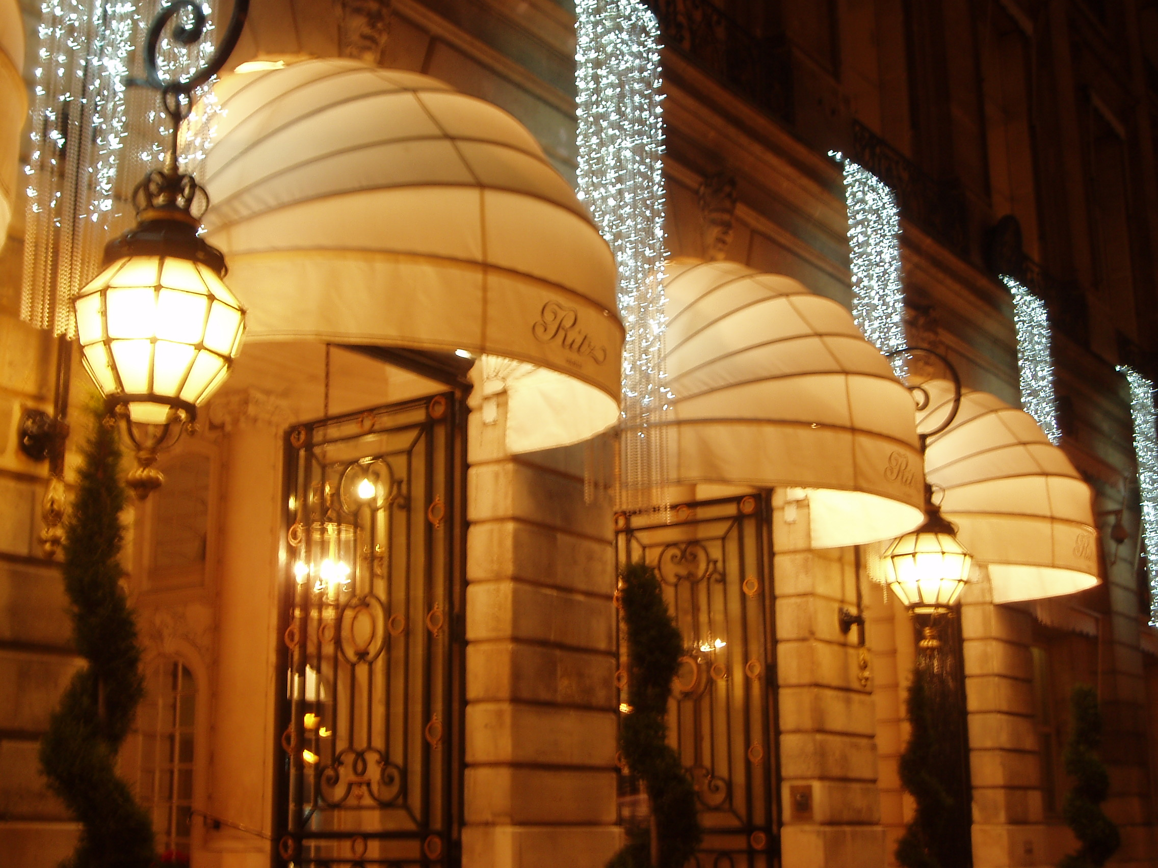 Hôtel Ritz Paris